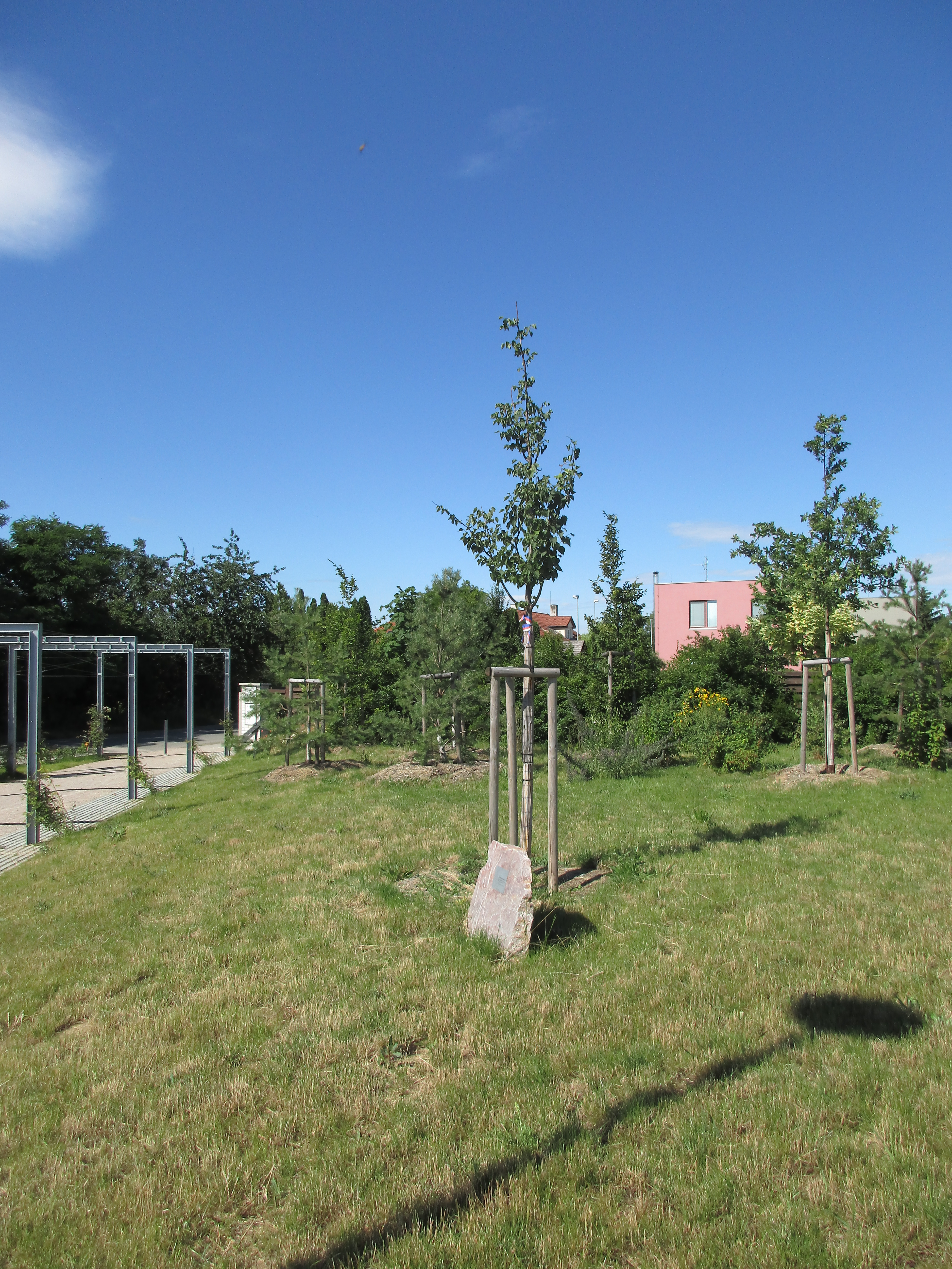 Lípa republiky. Praha 5 - Slivenec, Park Granátová. Vysazena 24. října 2018.